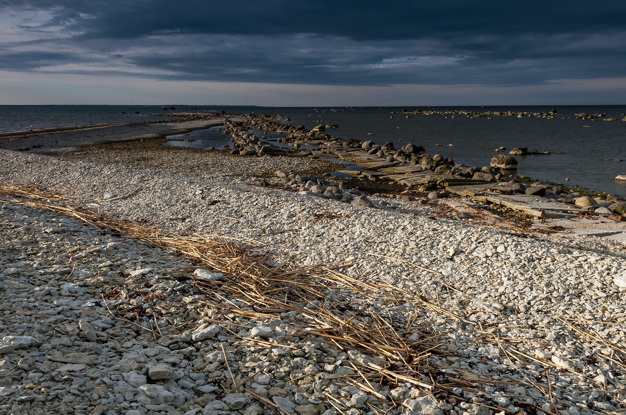 Osmussaar. Tiiru sihtkaitsevöönd.